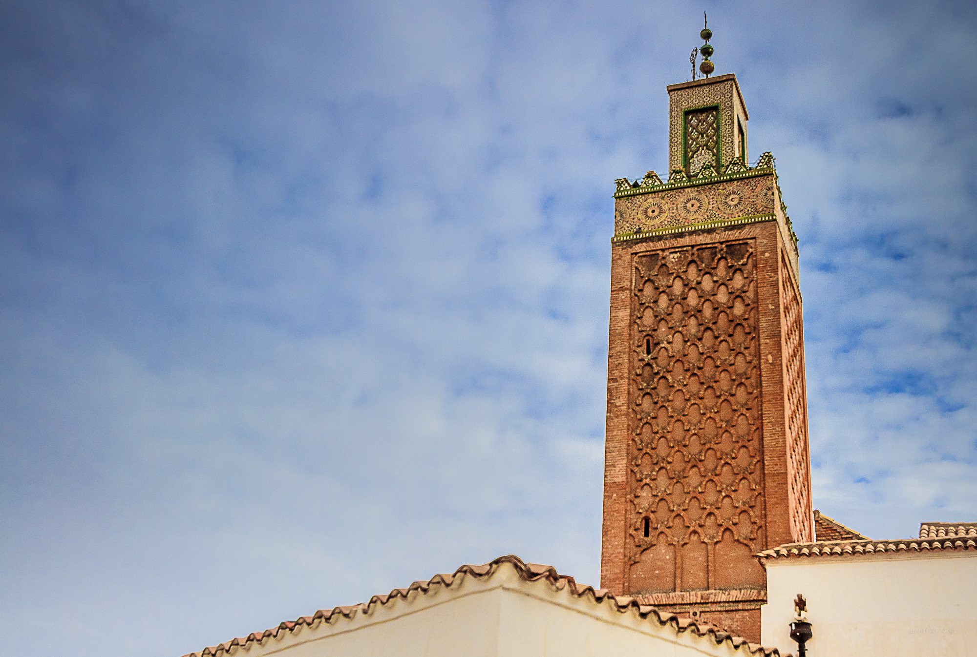 Vu sur le minaret de Sidi Boumédienne à Tlemcen. La mosquée d’El-Méchouar est construite en 1317 par le prince zianide Abû Hammû Mûsâ Ier. Elle est entièrement remaniée à l’époque ottomane et transformée en église pendant la colonisation. Après l’Indépendance, le monument redevient une mosquée.